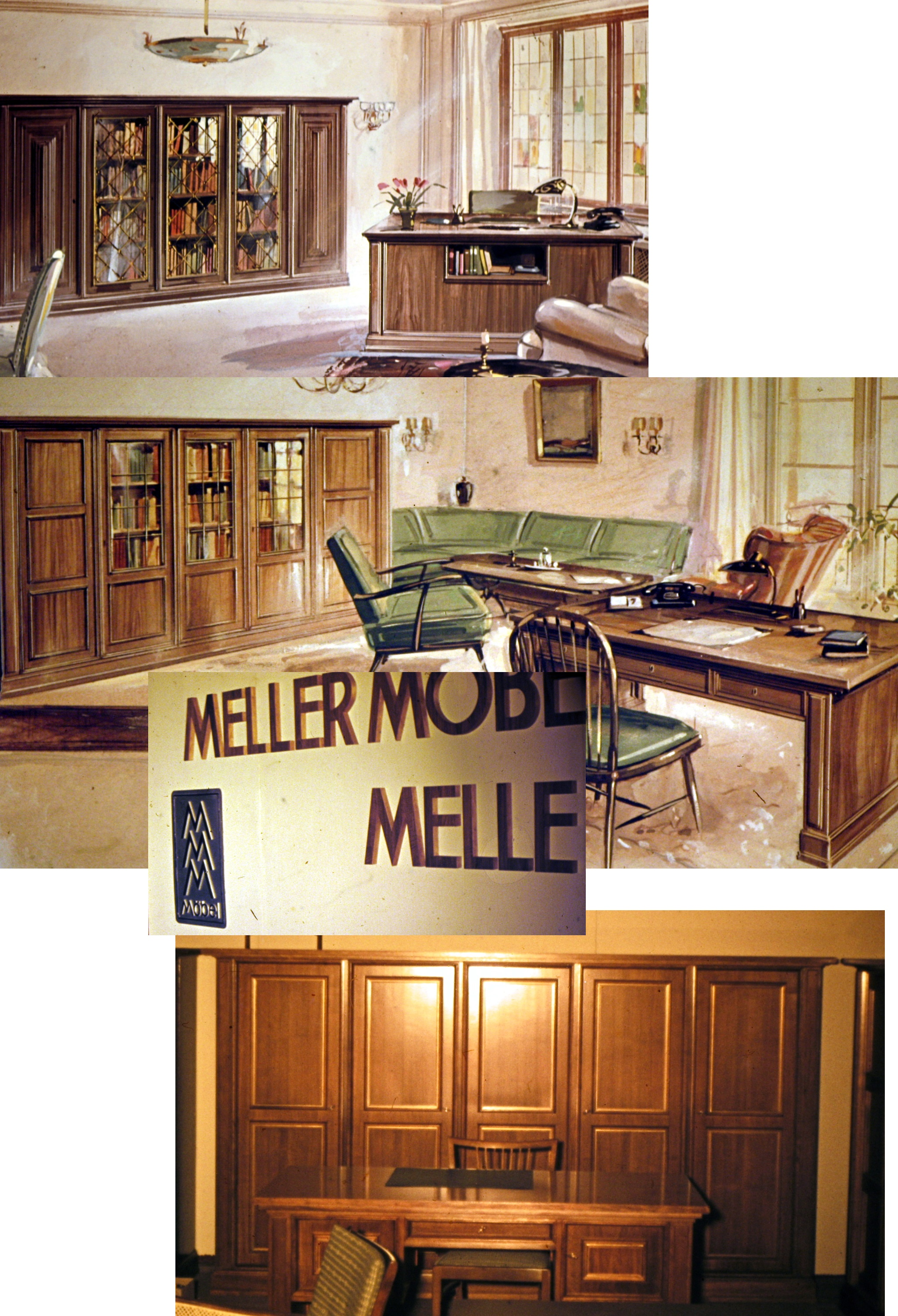 Möbelkatalog, Archiv Meller Möbelfabrik